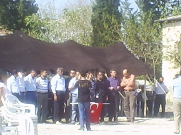 Adana iline bağlı İmamoğlu ilçesinde bulunan Ağzıkaraca köyünden bir görüntü.